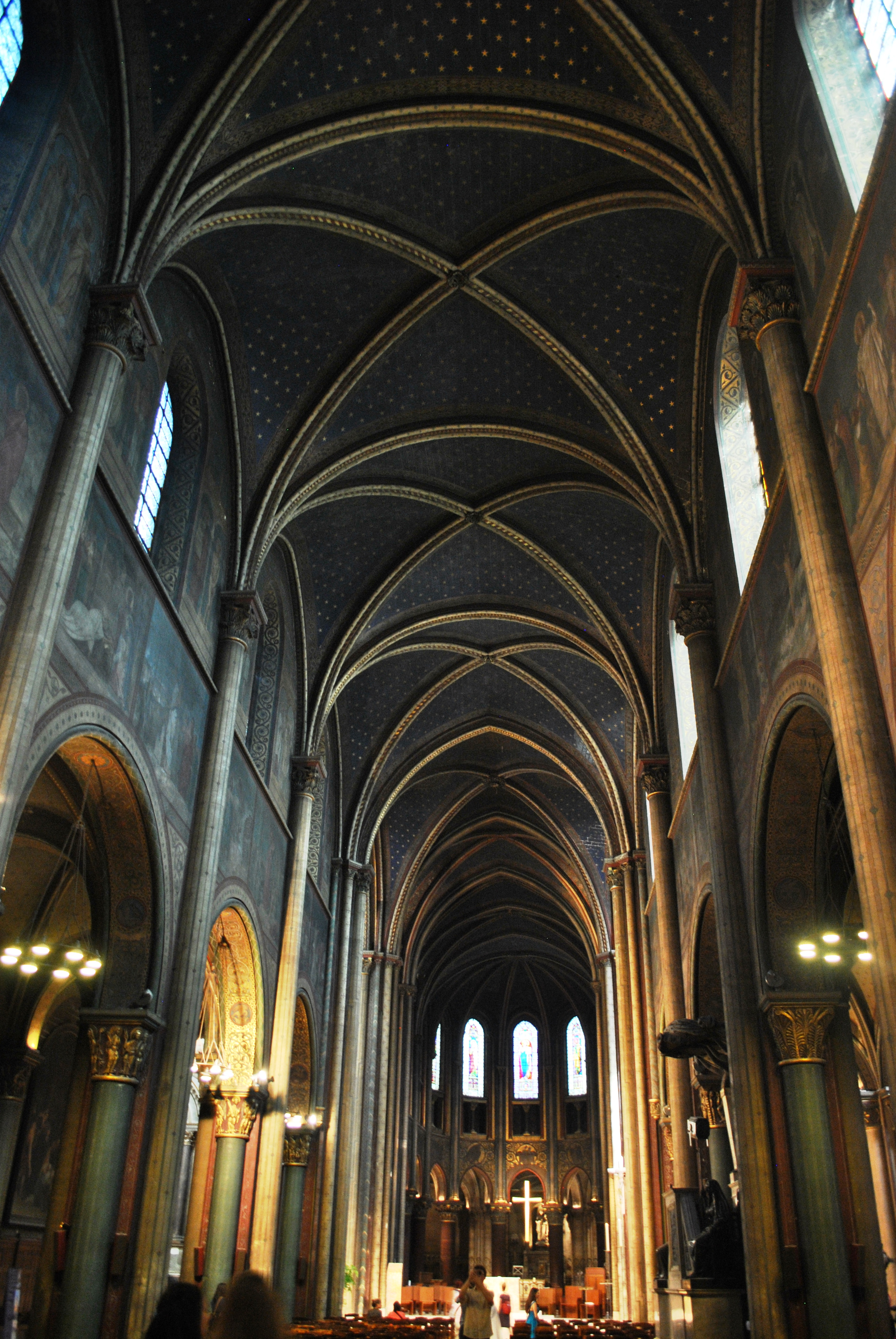 Église Saint-Germain-des-Prés (Classé)